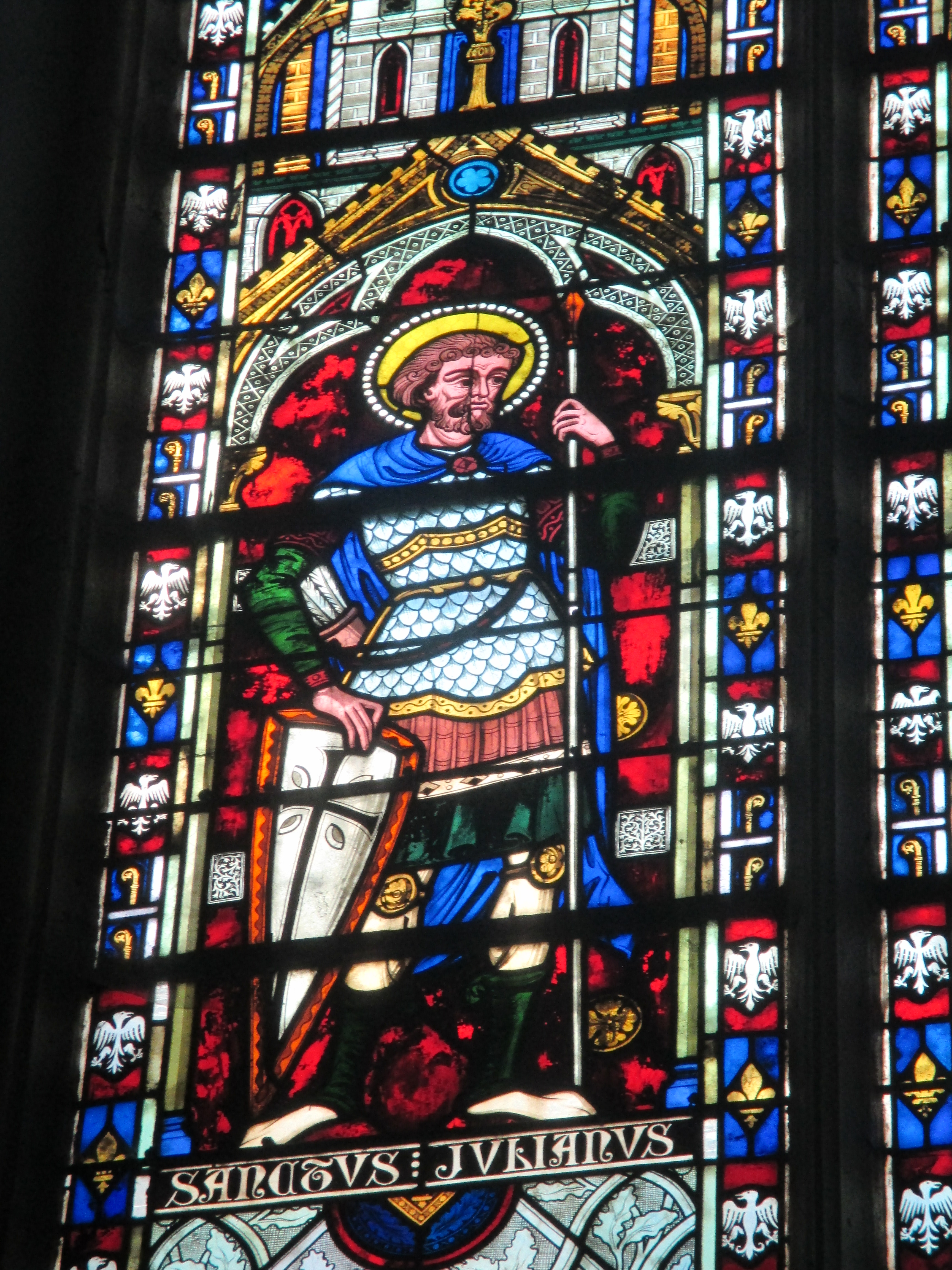 Vitrail représentant saint Julien. Cathédrale de Sens.